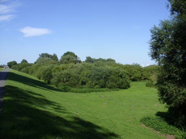 Vogelschutzgebiet Arsten-Habenhausen, Bremen-Obervieland, Ortsteil Habenhausen